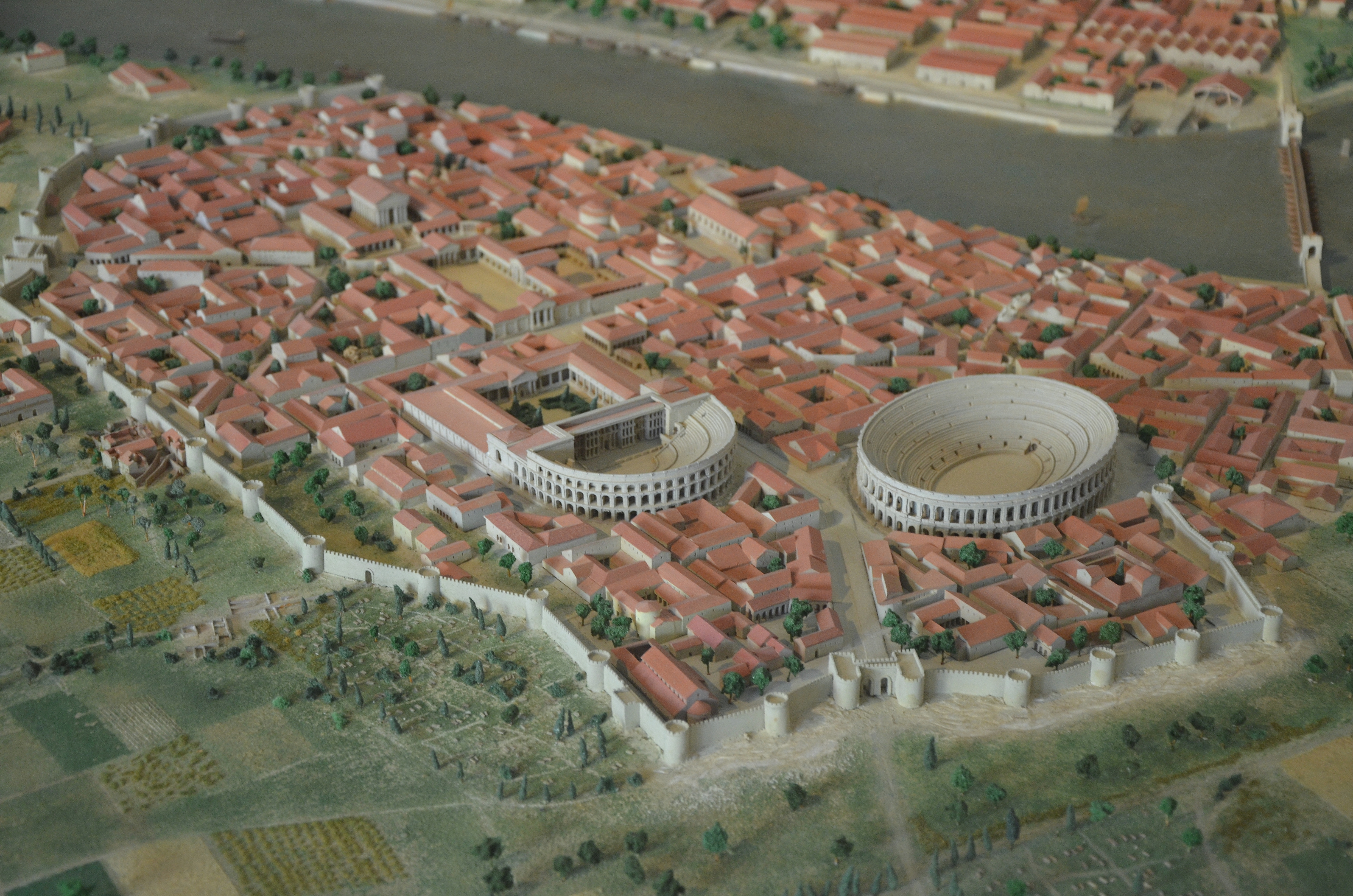 Musée de l'Arles antique, Arles, France